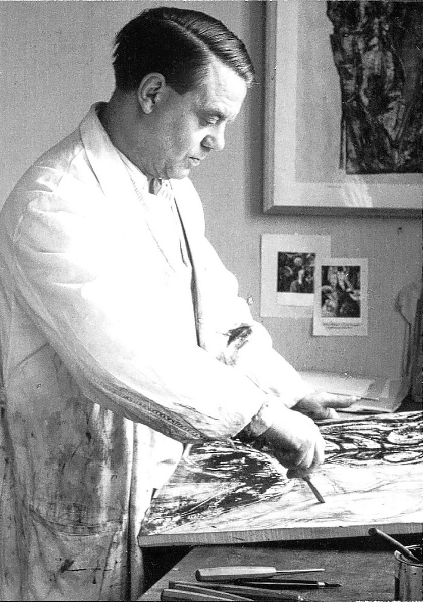 Fotographie des Malers Ernst Wolfhagen in seinem Atelier in Hannover